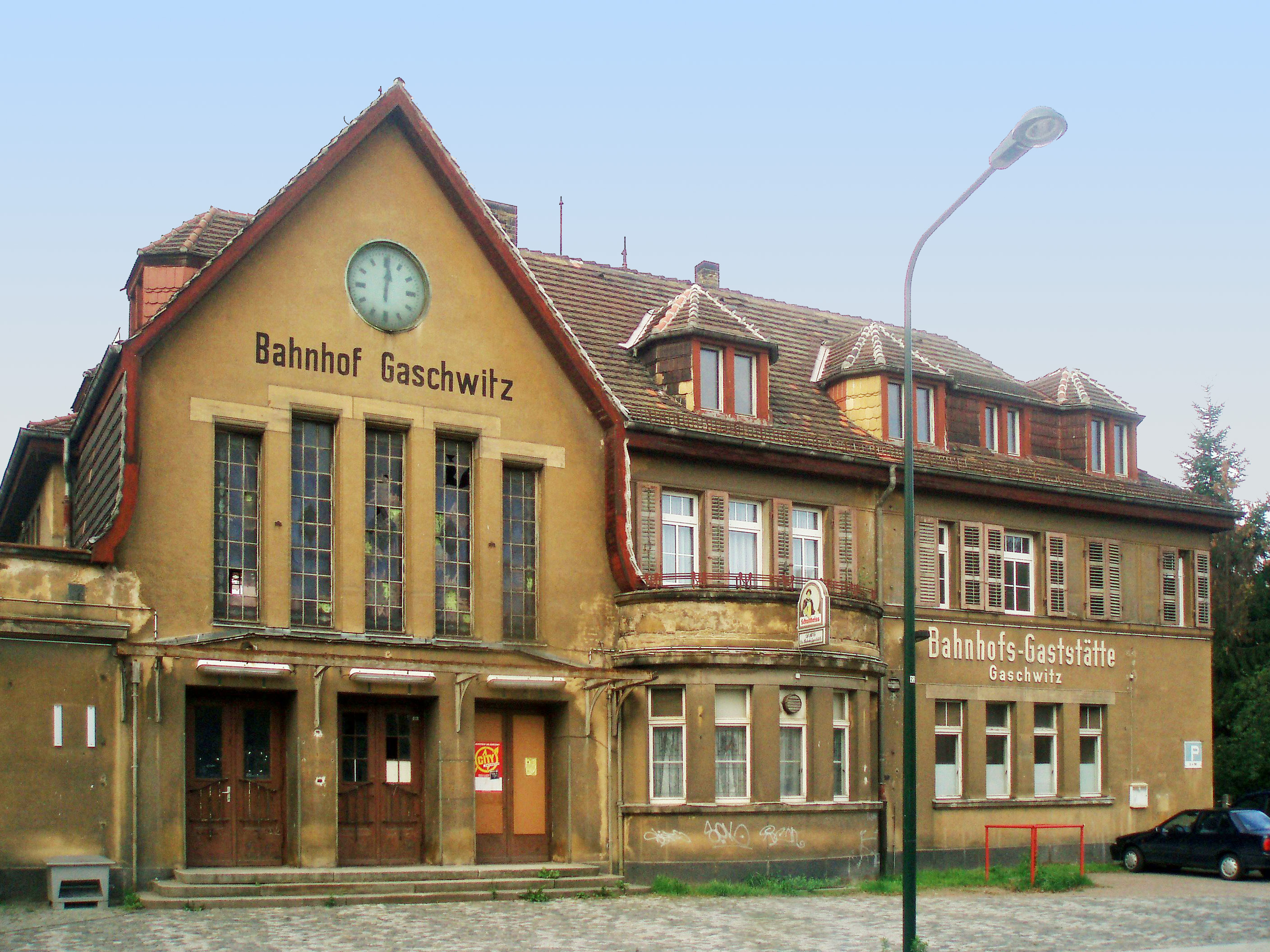 Bahnhof Gaschwitz, Markleeberg, Sachsen, Deutschland. Urheber: selbst erstellt